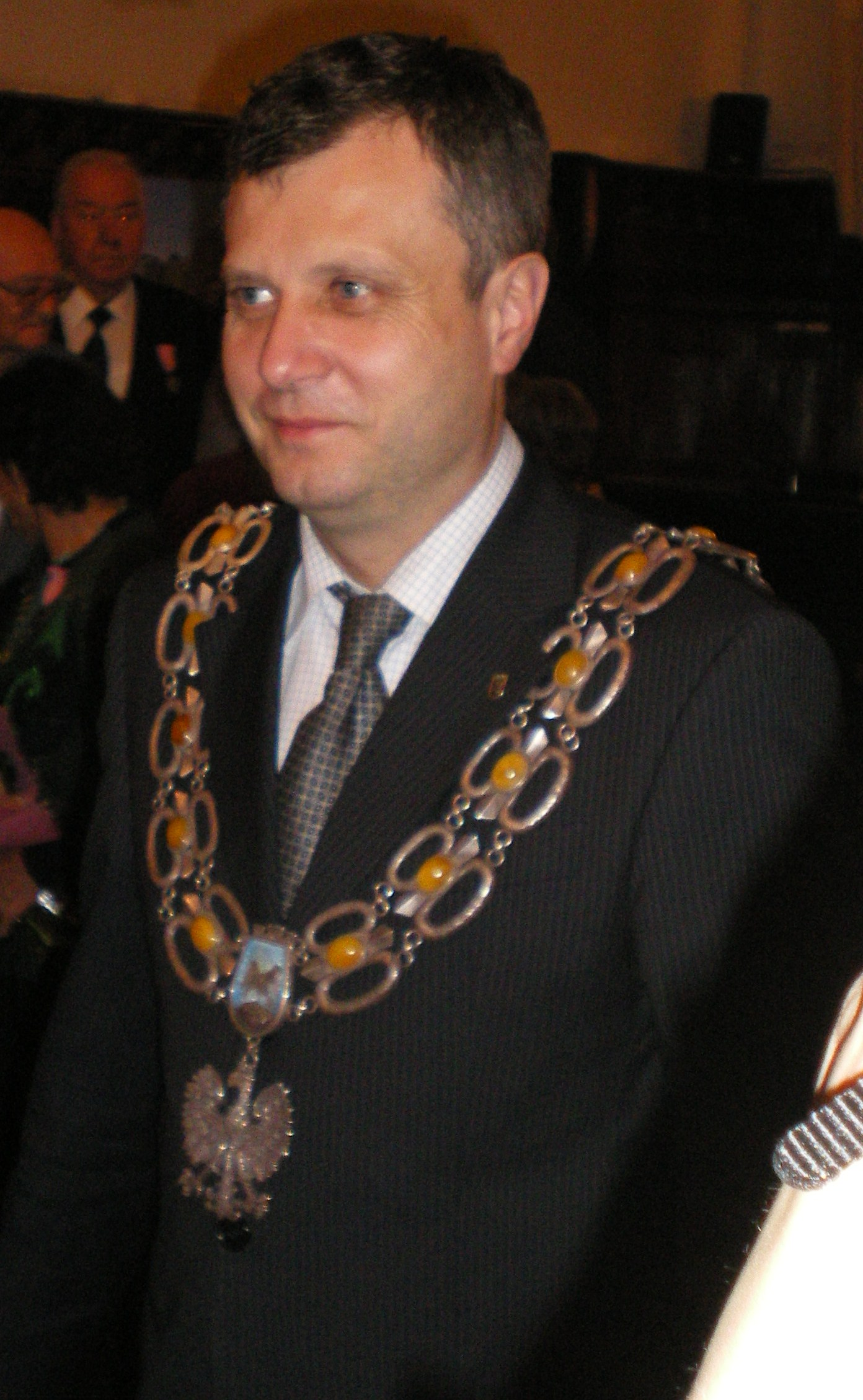 Prezydent Sopotu Jacek Karnowski podczas uroczystości wręczenia odznaczeń za długoletnie pożycie małżeńskie.